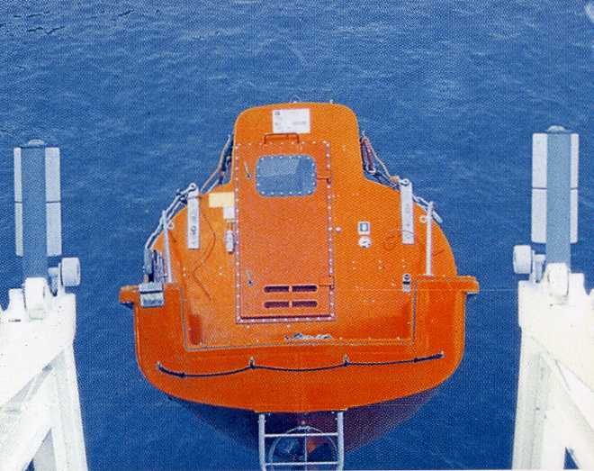 Rettungsboot